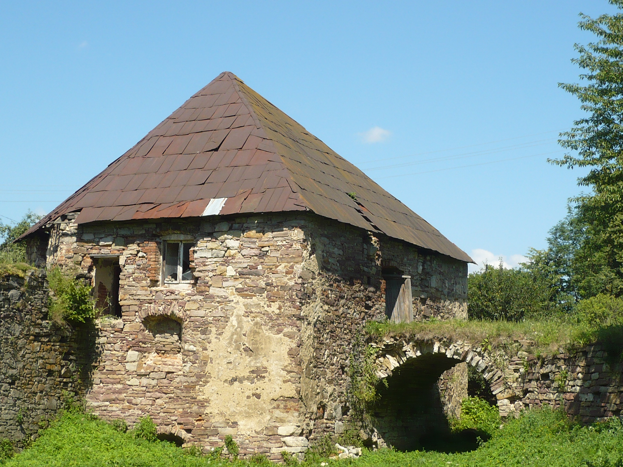 Potok Złoty. Zamek